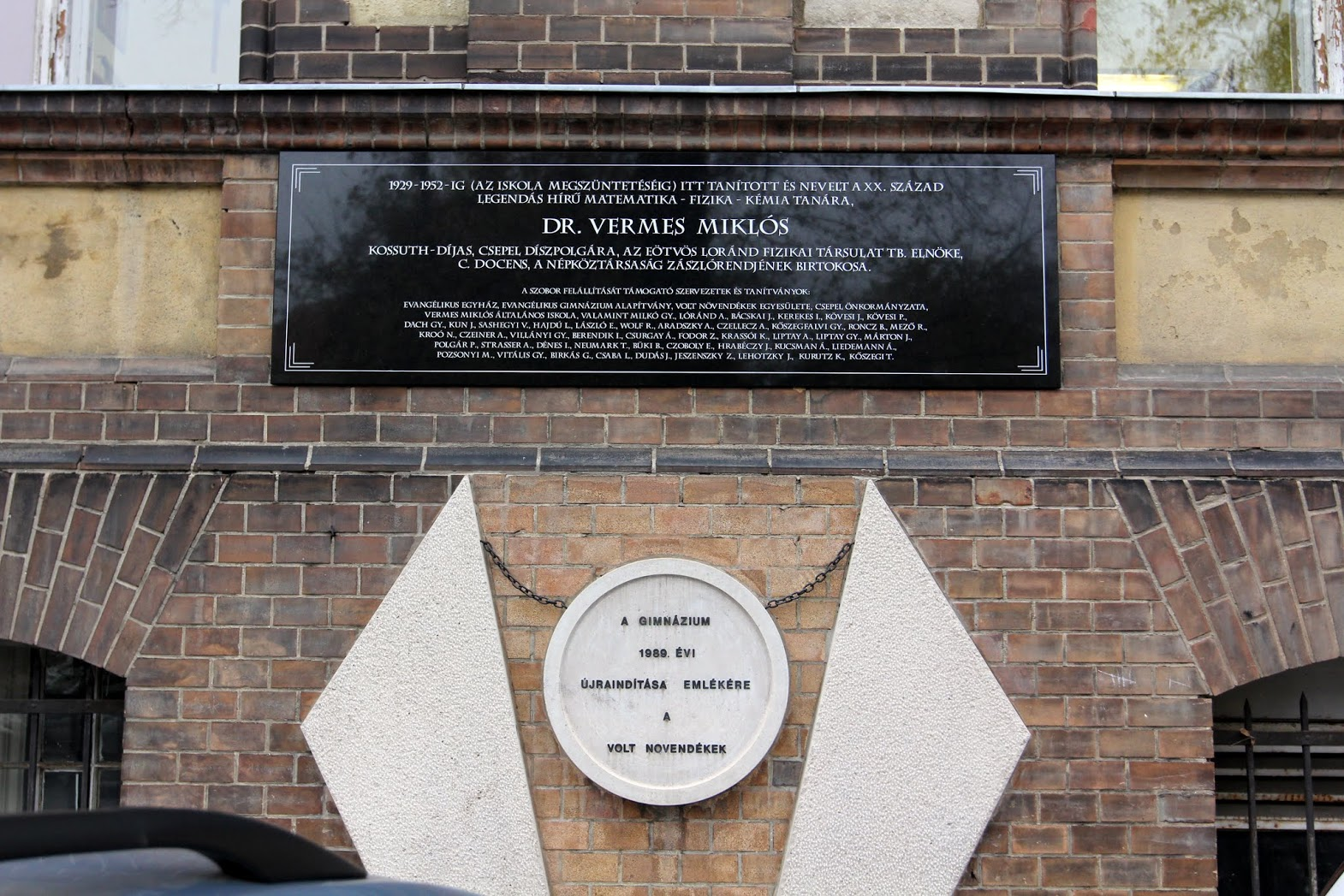 Két emléktábla a Fasori Gimnázium homlokzatán, Budapest VII., Városligeti Fasor 17–21. Vermes Miklós tanár emlékére. Másik fénykép: File:Vermes Miklós plaque Bp07 Városligeti fasor17-21.jpg A gimnázium 1989. évi újraindítása emlékére. Másik fénykép: File:BEG Varosligeti17.jpg